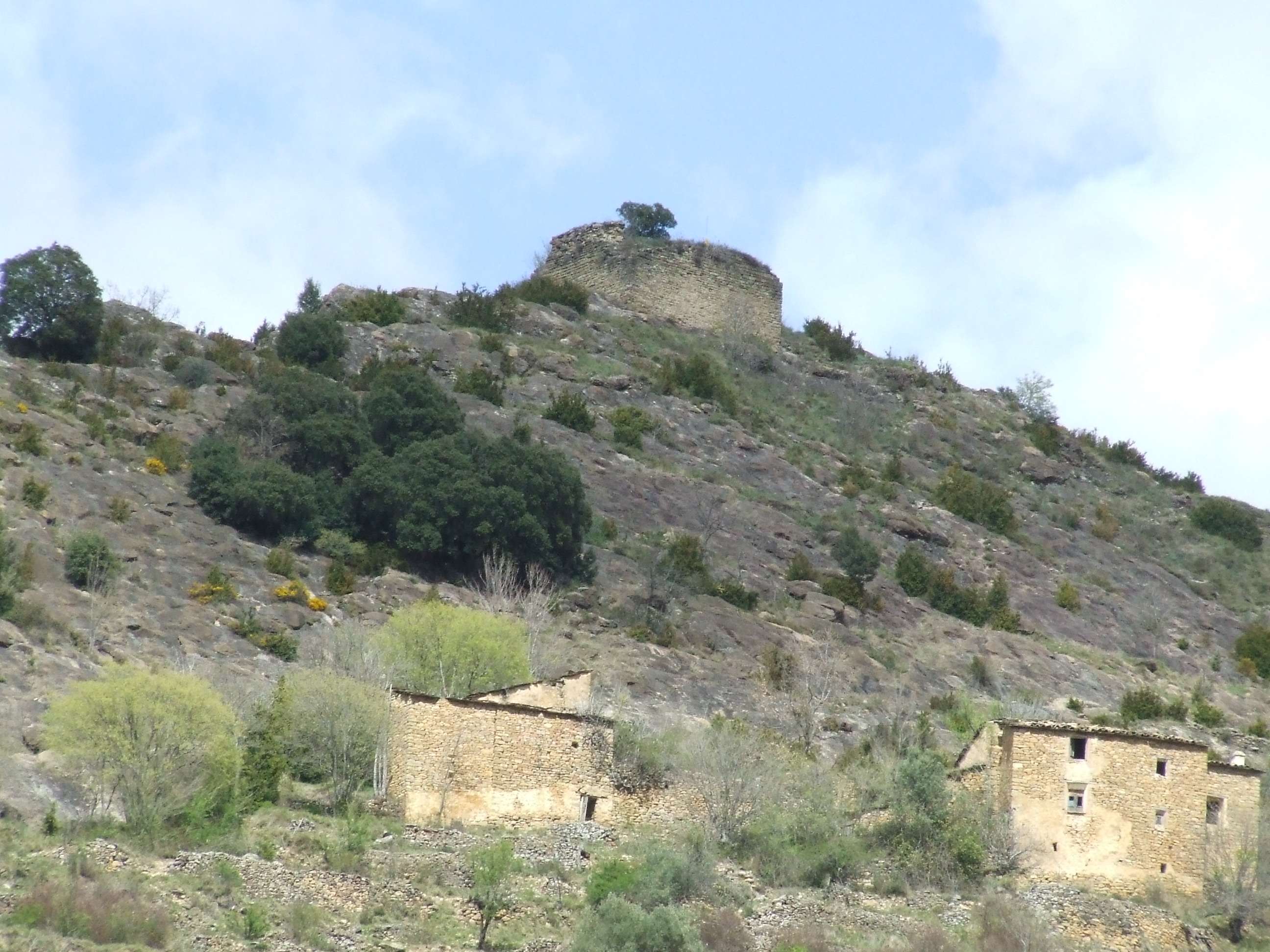 El Castell d'Orrit (Sapeira, Tremp, Pallars Jussà)